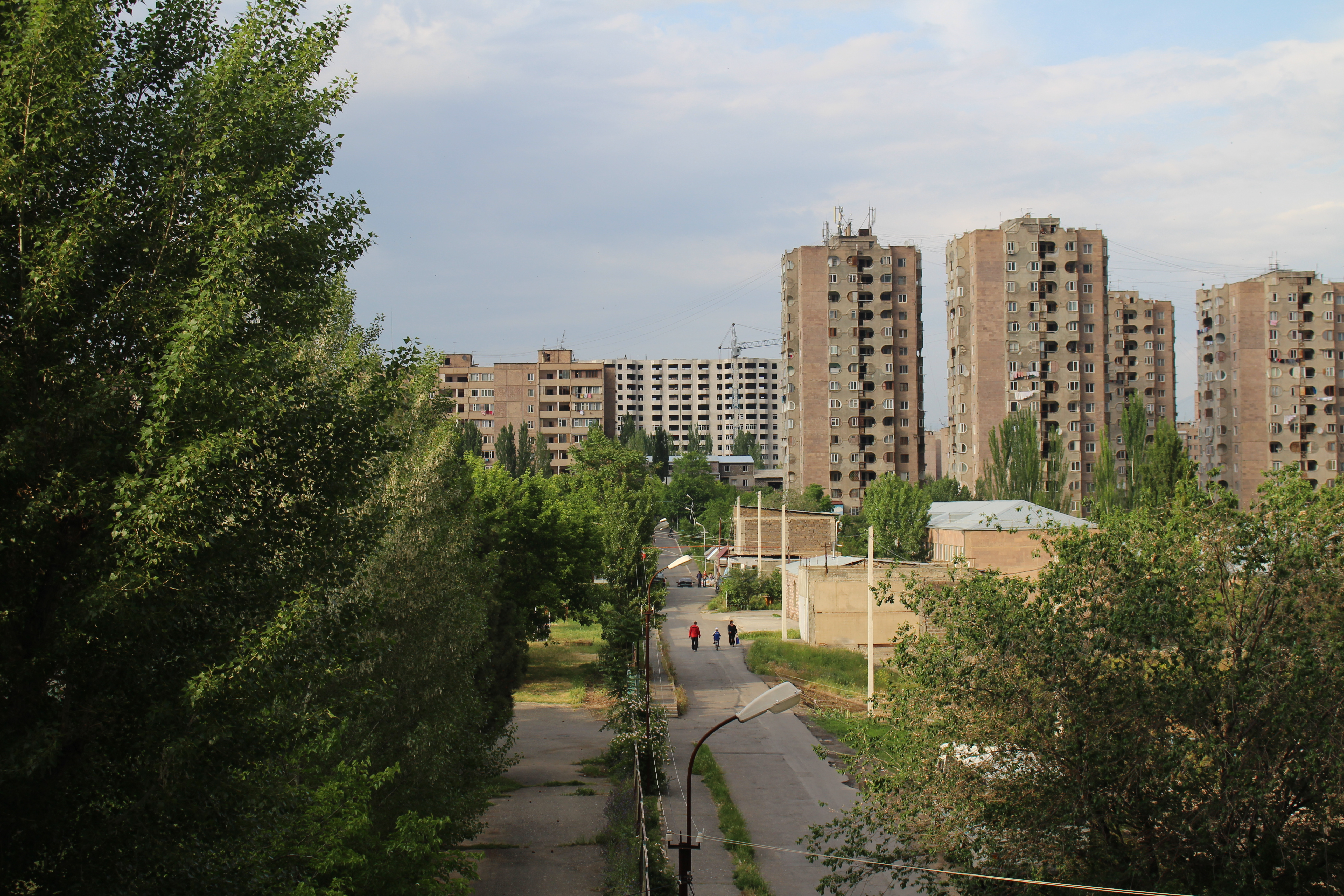 Դավիթաշեն վարչական շրջան, 1-ին թաղամաս